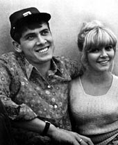 Gianni Morandi e Laura Efrikian nel 1966 Fonte:sopi.it Licensing 1966 1966